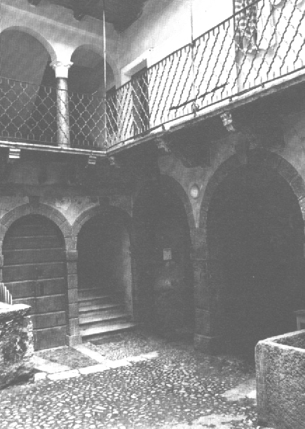 Il Ghetto di Rovereto, in Valbusa Grande come si presentava nel secolo scorso